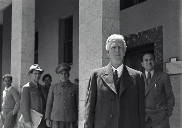 ירושלים - ג'ימס מקדולנד